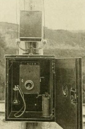 Elmira and Seneca Lake Railway - Telfon an Telegraphenmast